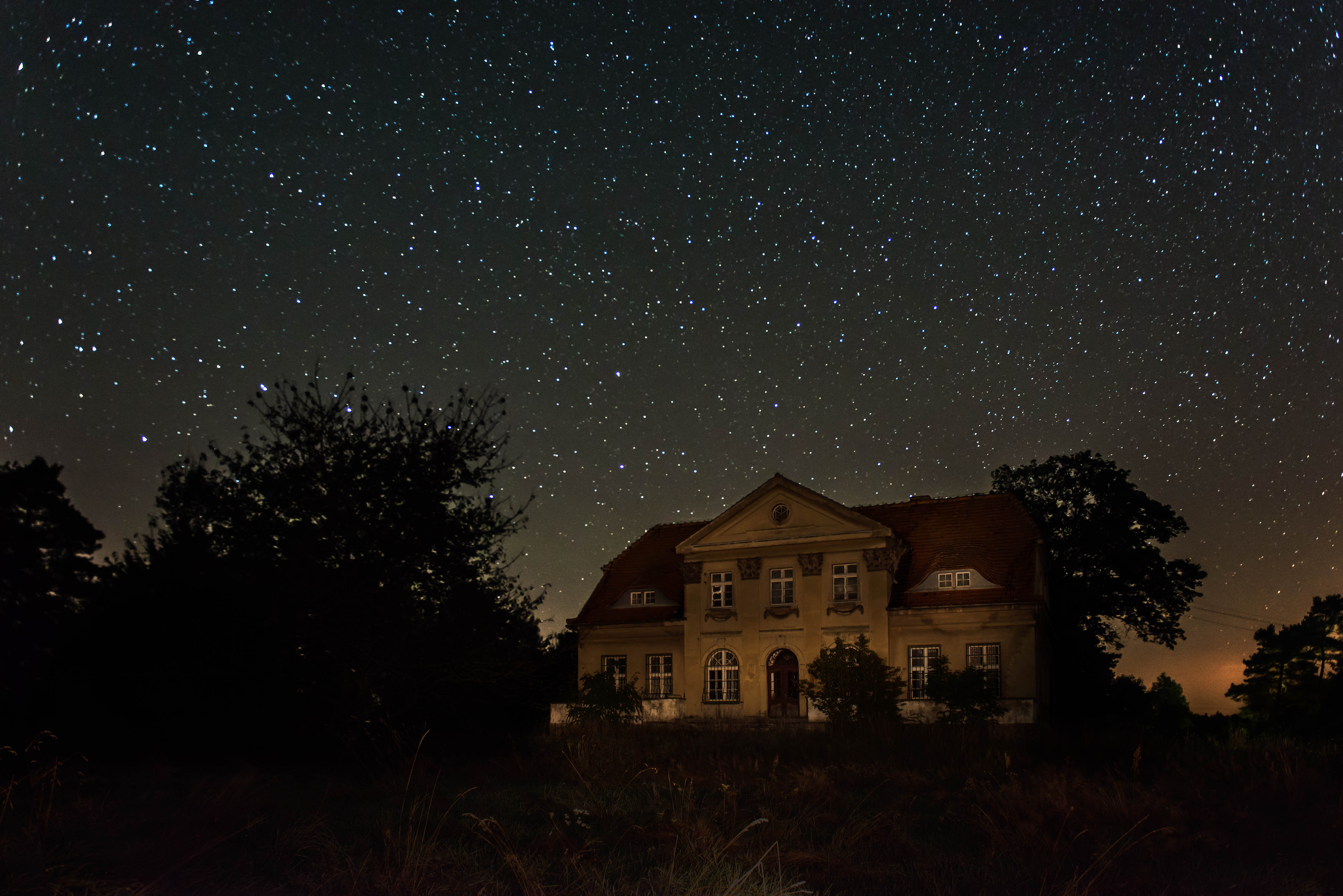 Gosław - neoklasycystyczny dwór z 1925r.